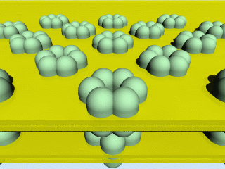 Description : vue 3D des jonctions communicantes. Type : Image de synthèse. Source : Auteur : L Delépine (fenkys) Copyright : License : GNU FDL